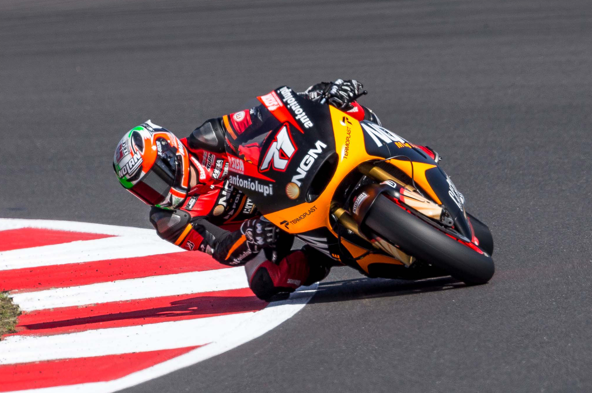 Claudio Corti a Silverstone nel 2013